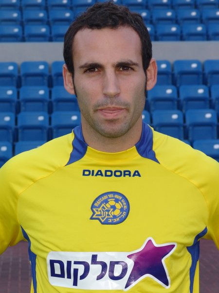 אבי יחיאל, שחקן מכבי תל אביב (Avi Yehiel of Maccabi Tel Aviv)